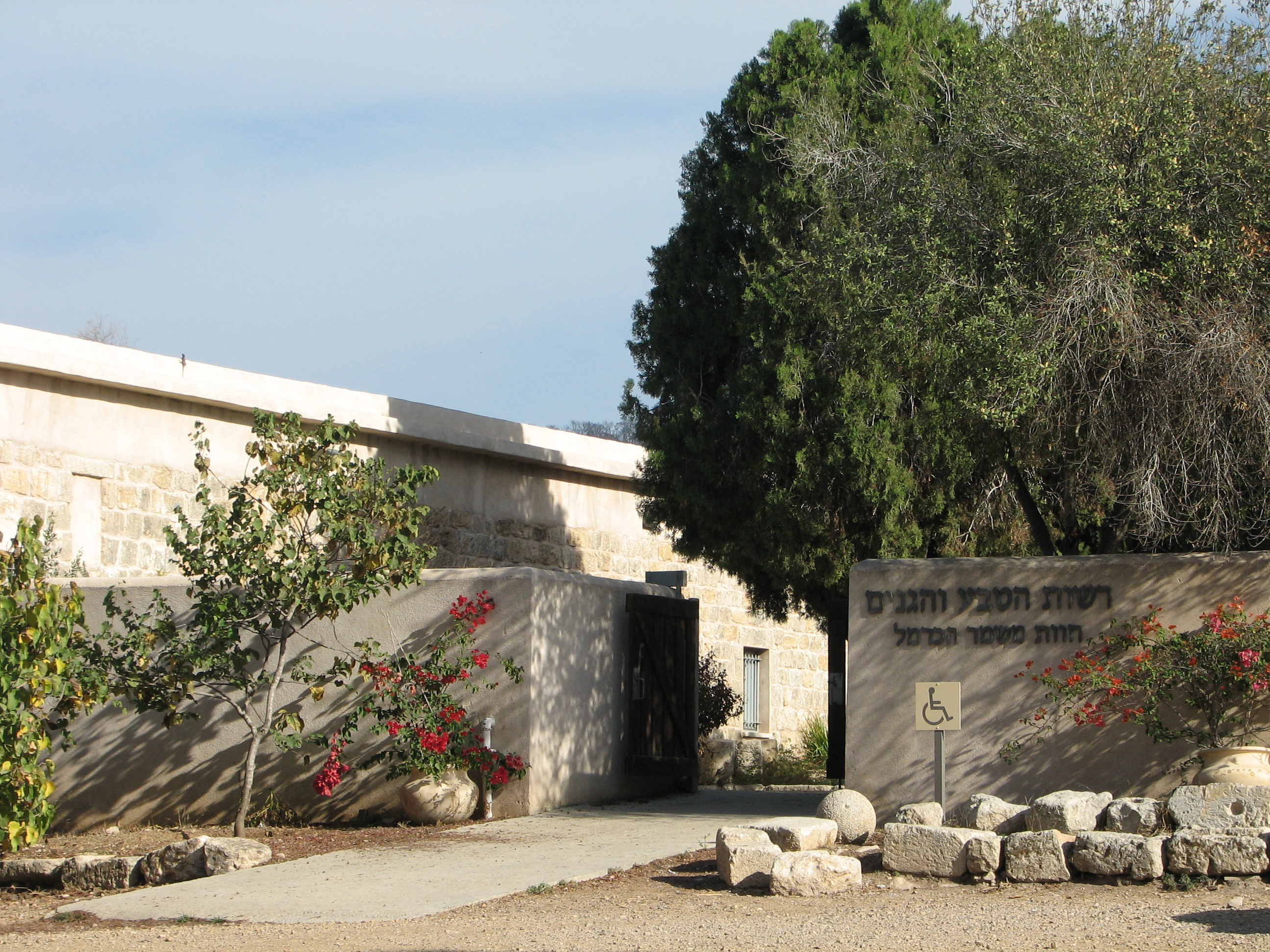 חוות משמר הכרמל או בשמה המקורי "ח'ירבת שלאלה" שוכנת על גבעה מורמת בלב הכרמל. באתר מבנה חאן עתיק. היום משמשת כמרכז לפעילות של רשות הטבע והגנים